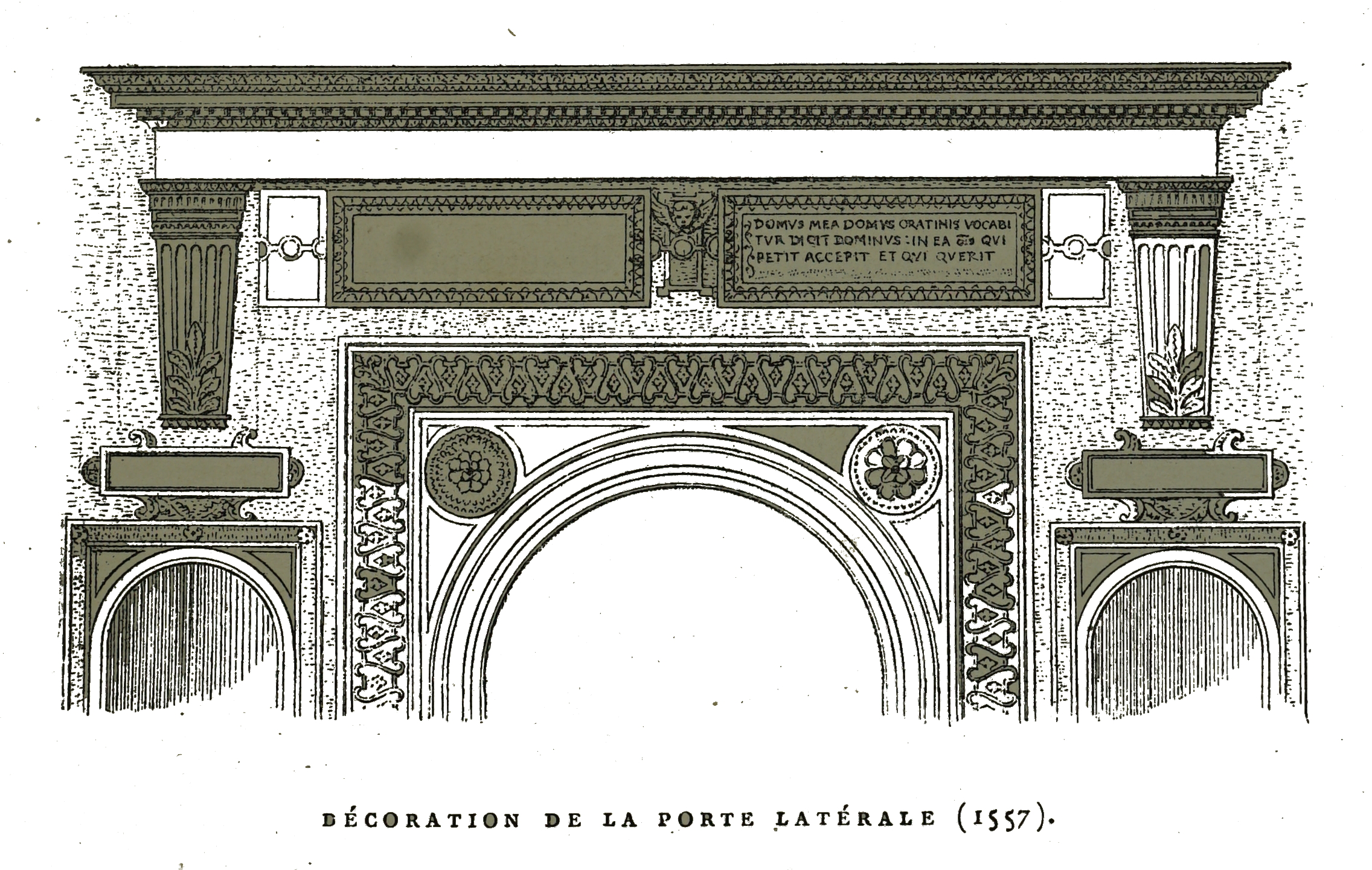 sur un dessin de Fichot.